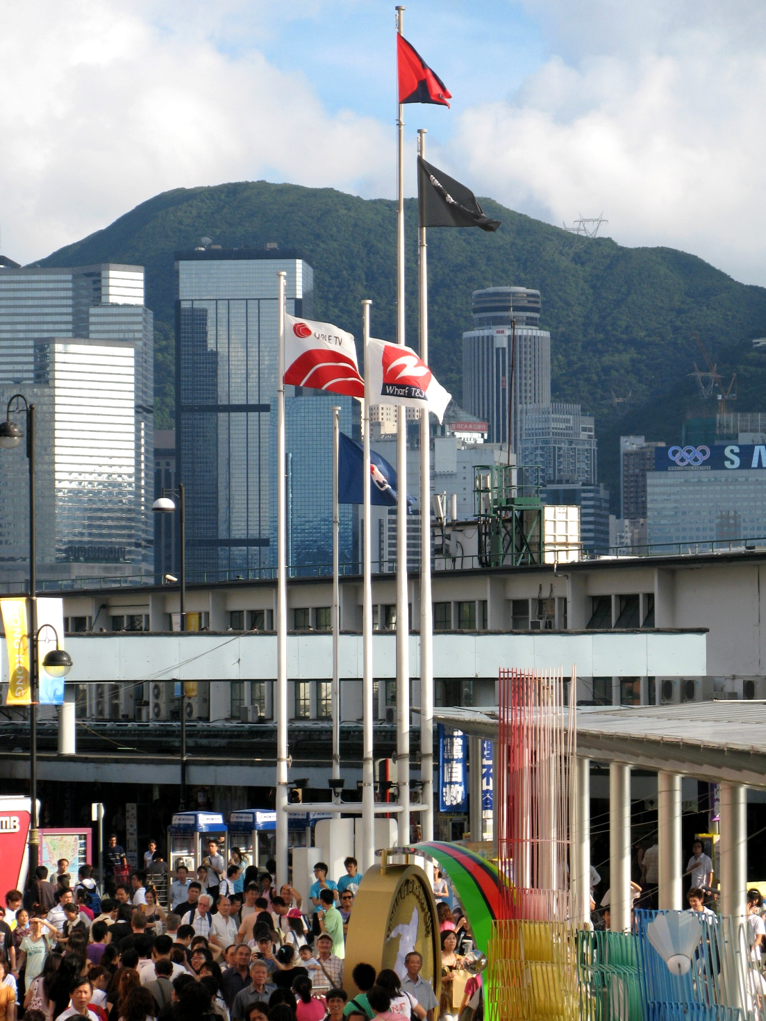 Harbour City flags 海港城南面入口前的五支旗桿